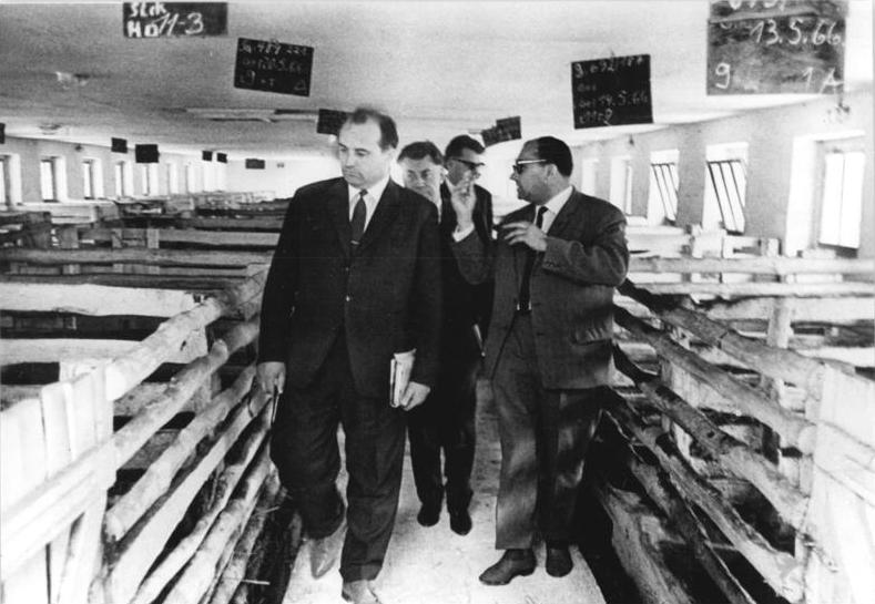 LPG Golßen, Besuch durch KPdSU Delegation ADN-ZB Repro zei 26.11.86 Bez. Cottbus: KPdSU-Delegation-Zum Studium von Erfahrungen der Parteiarbeit besuchte vom 31.5. bis zum 10.6.66 eine Delegation der KPdSU, der u.a.M.S. Gorbatschow (l.), Leiter der Abteilung für parteiorganisatorische Arbeit des Regionskomitees Stawropol der KPdSU, angehörte, die DDR. Am 4.6. weilte die Delegation in der LPG Golßen. Dabei wurden u.a. auch die Ställe der Schweinezuchtanlage beabsichtigt.